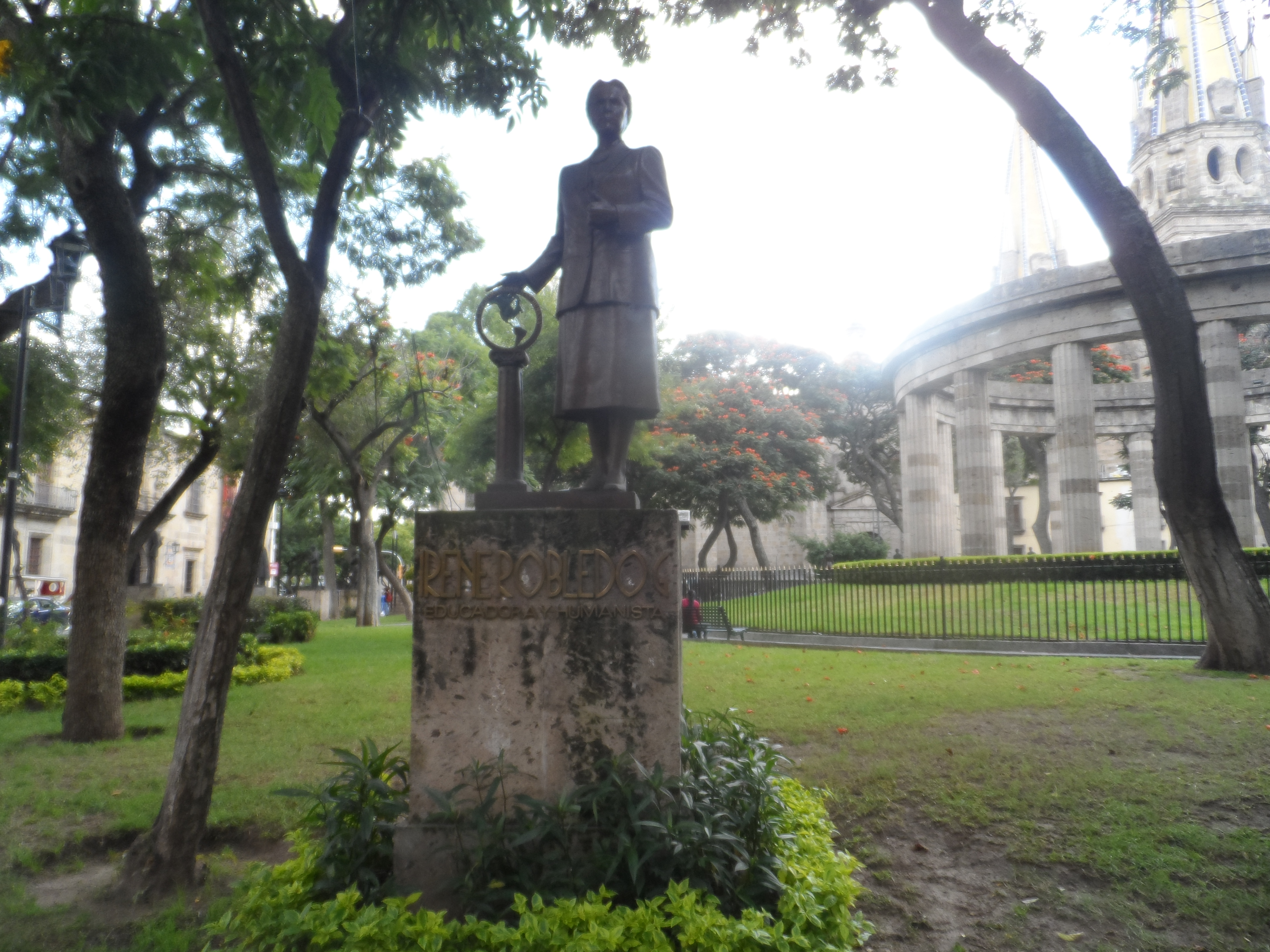 Estatua de la humanista y educadora jalisciense Irene Robledo García en la "Rotonda de los Jaliscienses Ilustres".